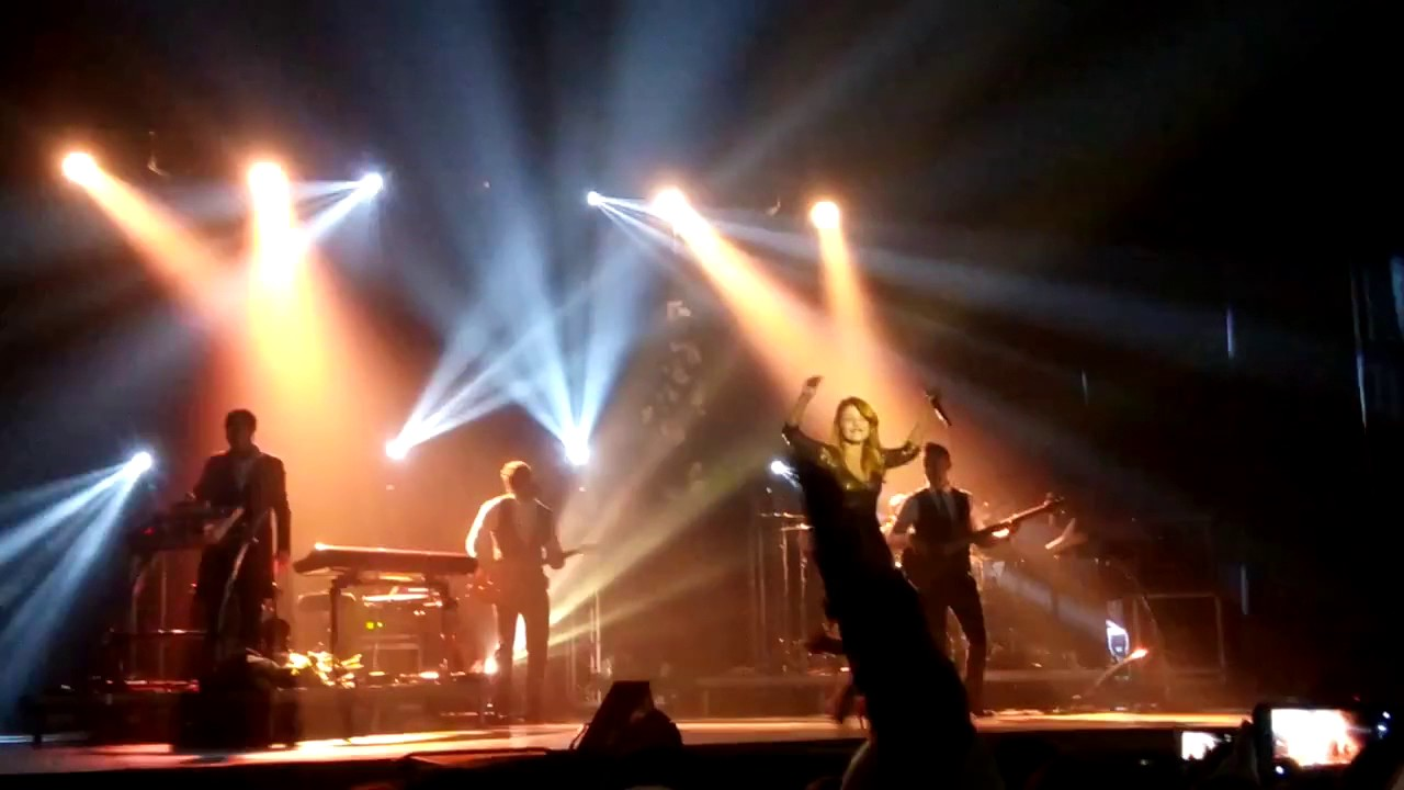 Мелитополь